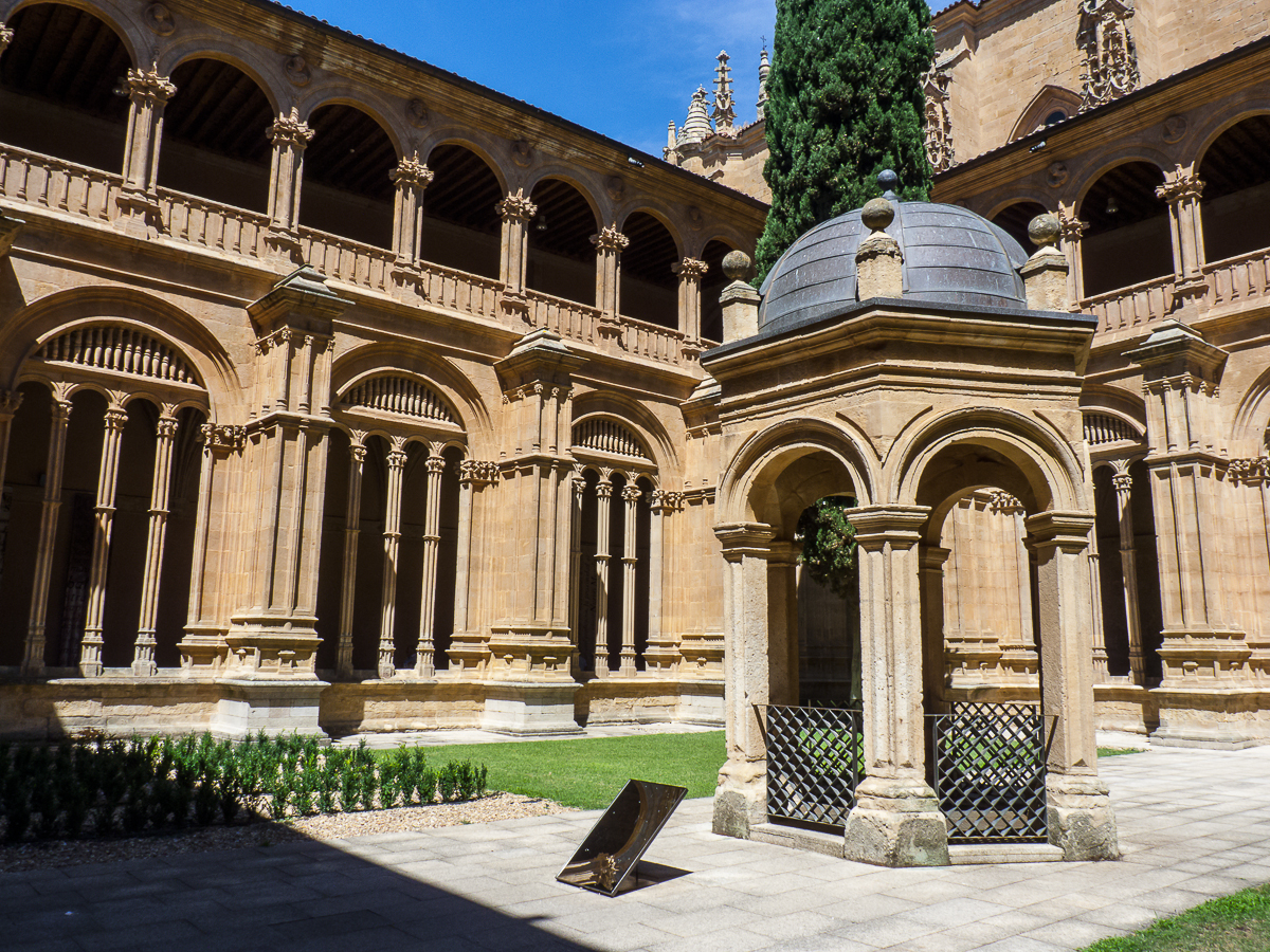 04082013 130746 SALAMANCA 0963